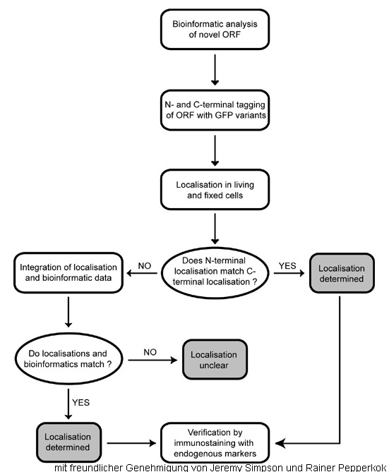 Flow-Chart: Strategie zur Festlegung der finalen Proteinlokalisation